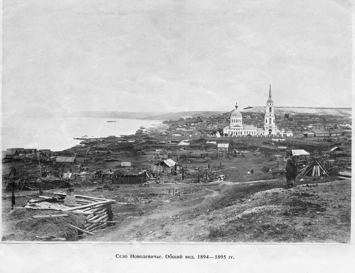 Село Новодевичье на Волге. Симбирская губерния, Сенгилеевский уезд, 1895 год.